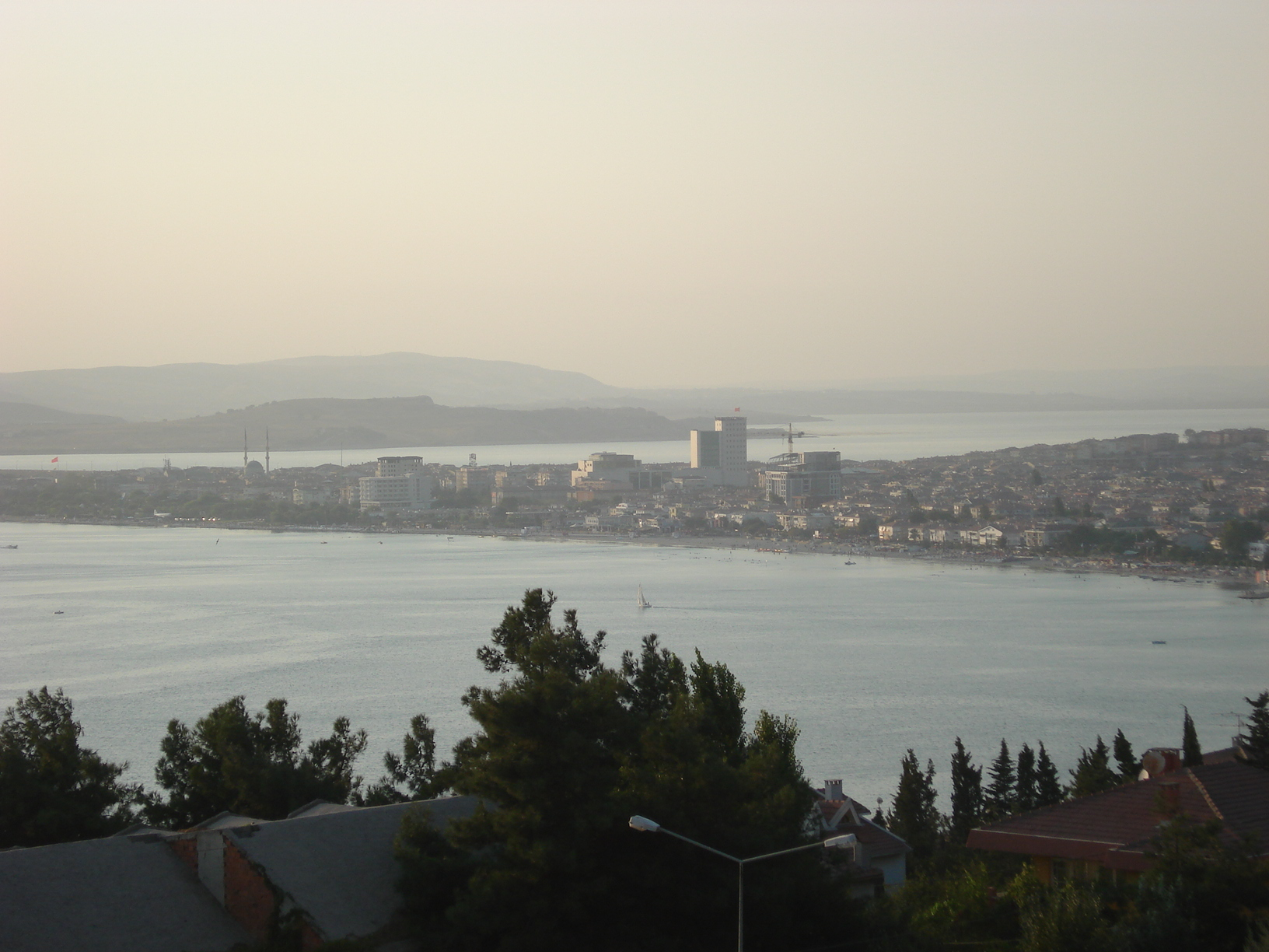 The Büyükçekmece Lake from Gürpınar